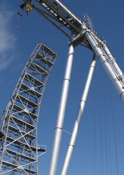 Специальный кран (translation: "Special crane")